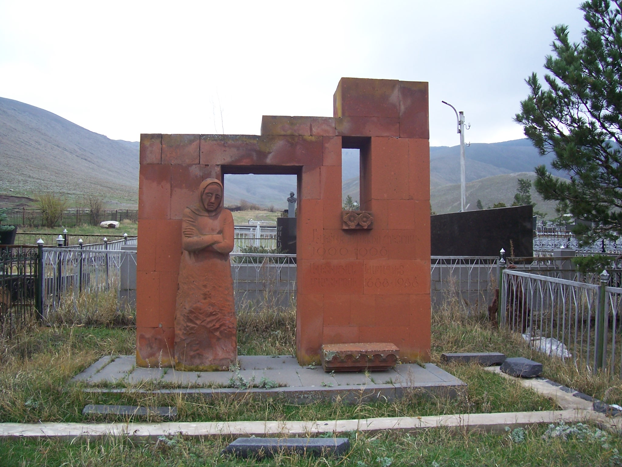 no original description